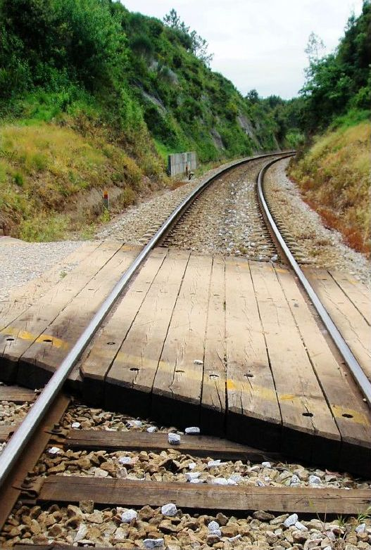 My path